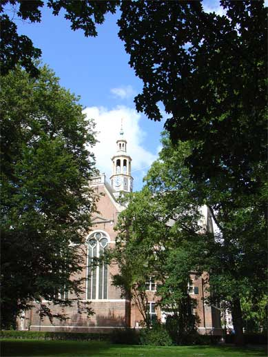 Nieuwe Kerk te Groningen (Hortusbuurt)